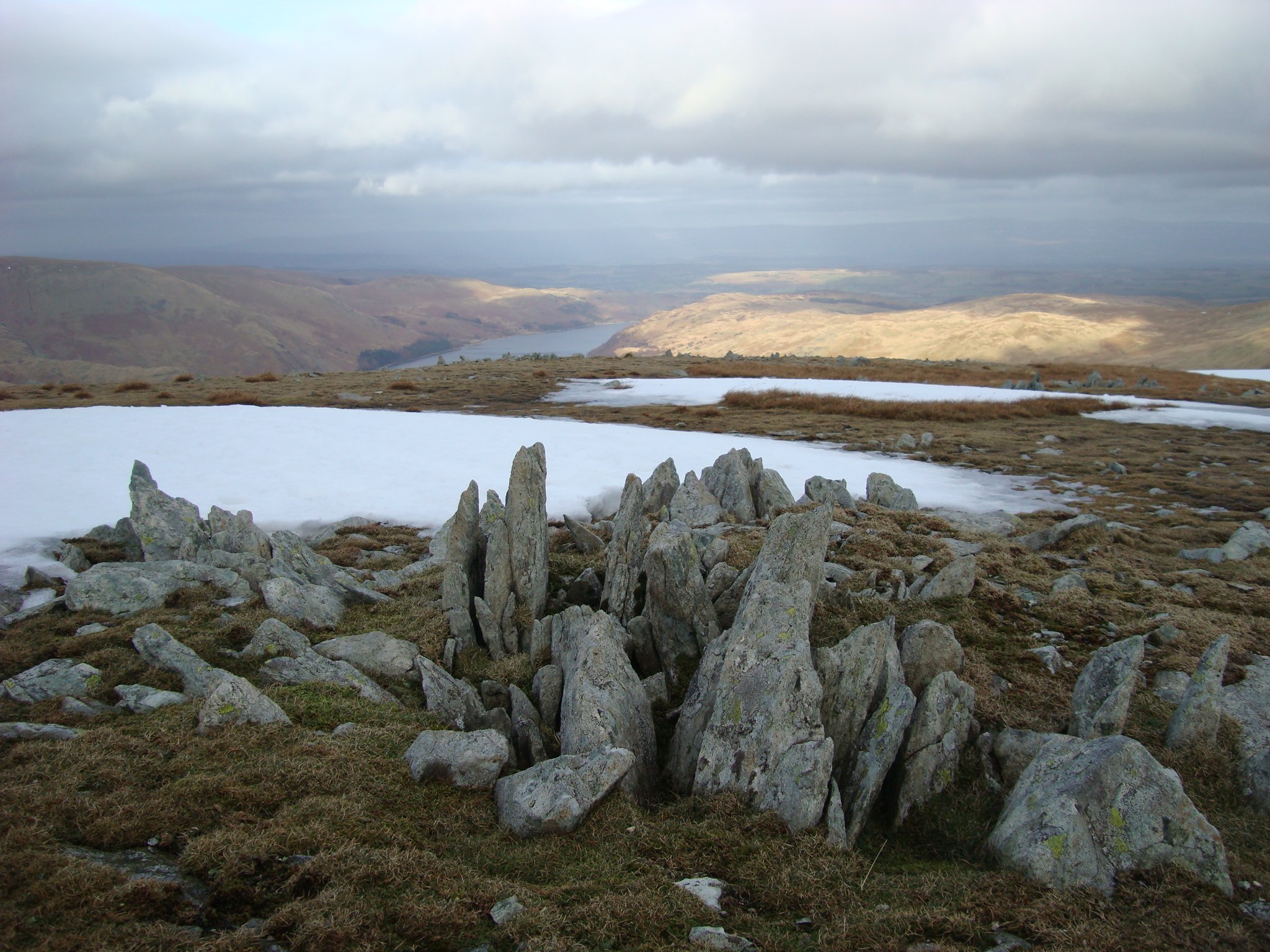 Mardale